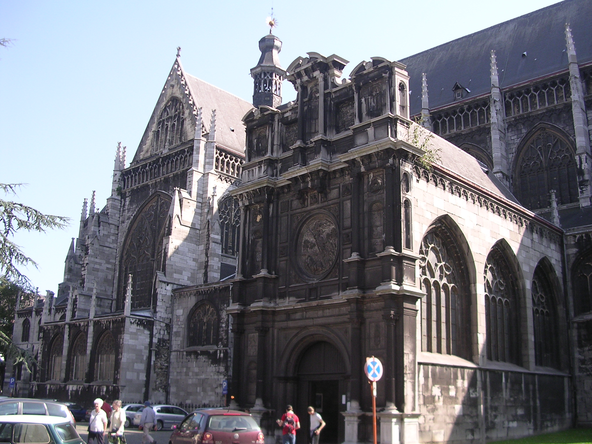 vue de l'extérieur